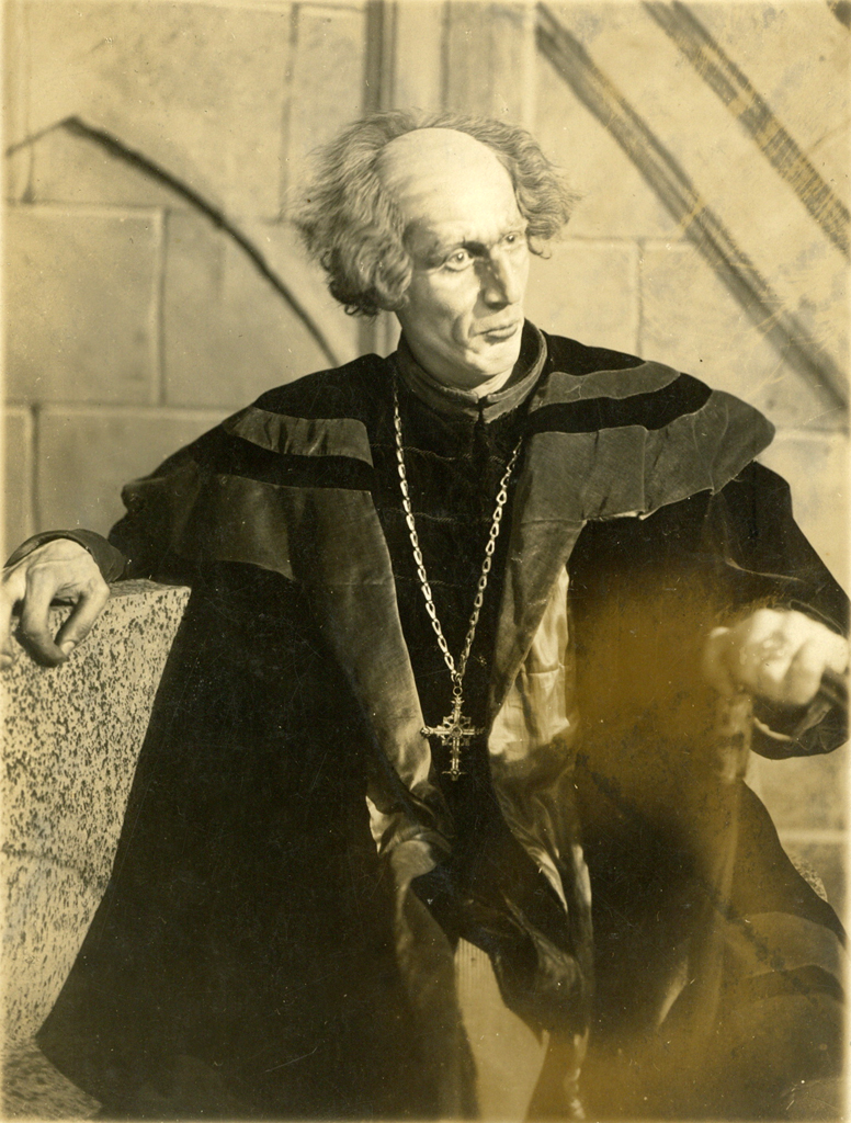 Anton Novačan, Herman Celjski, Narodno gledališče v Mariboru. Na fotografiji: Vladimir Skrbinšek (Herman Celjski).